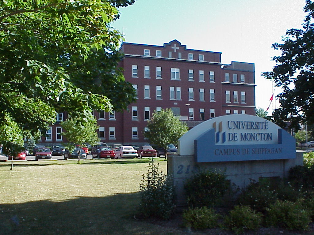 Édifice du campus de Shippagan de l'Université de Moncton, Shippagan, Nouveau-Brunswick, Canada.